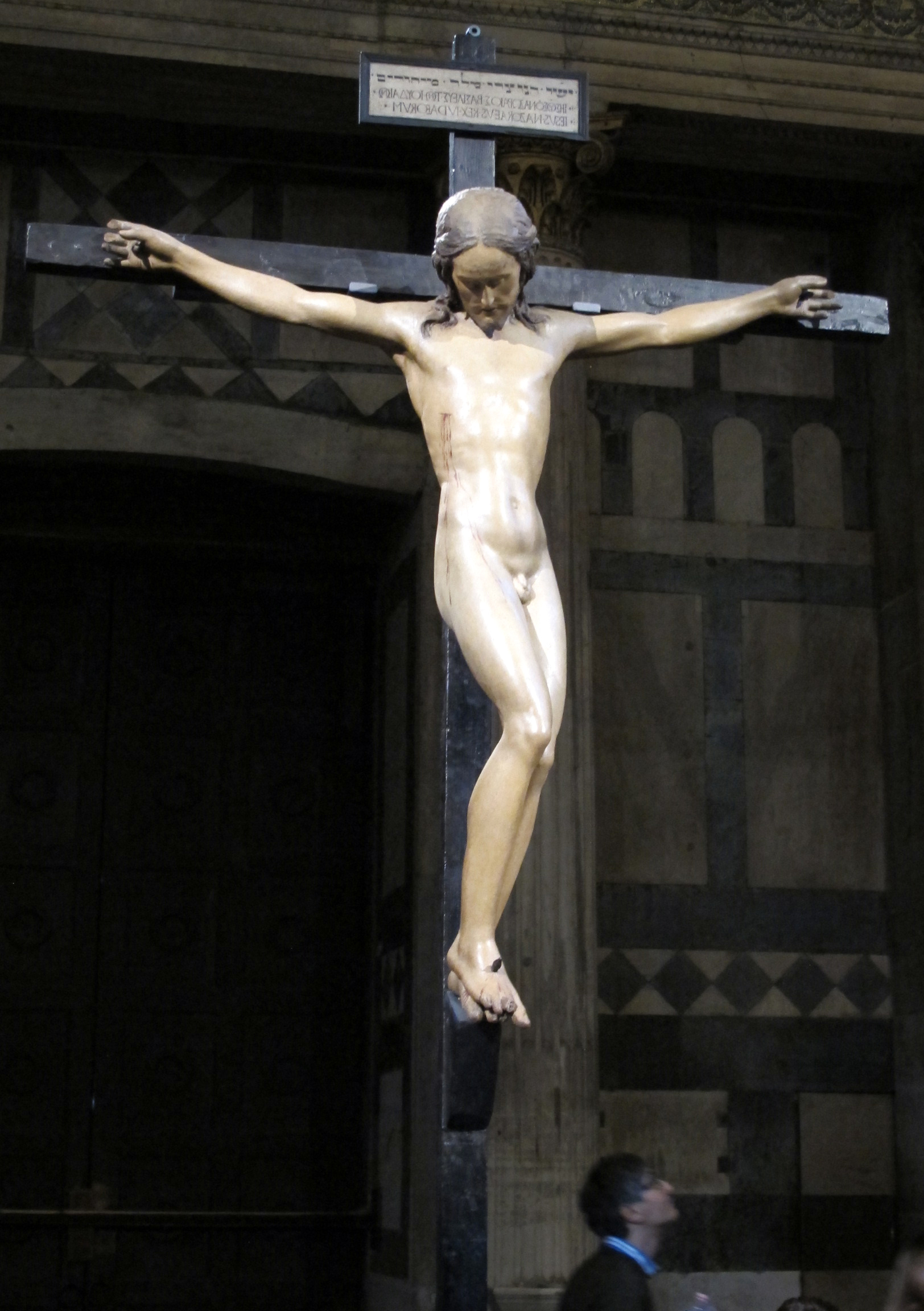 Installazione florens 2012 crocifisso michelangelo